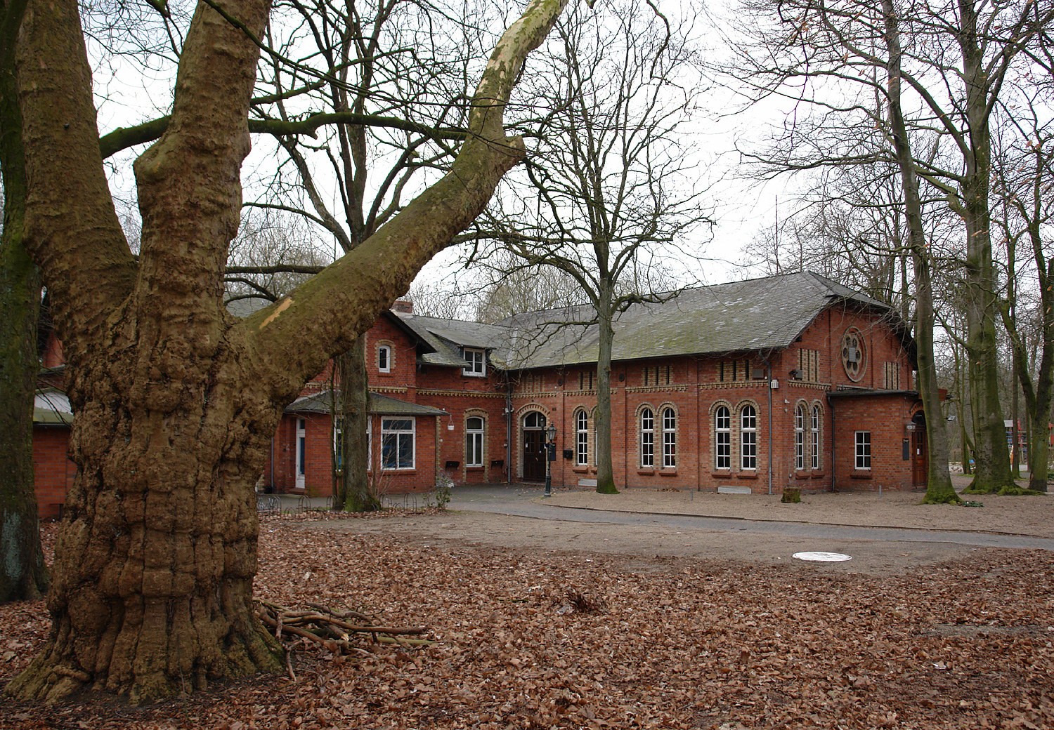 Nordwolle in Delmenhorst. Die „Alte Kämmerei“, heute ein Lokal